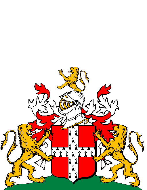 Armoiries concédées en septembre 1649 à François II Liberge (1612-1661), écuyer, vicomte de Plasnes et d’Échanfray.